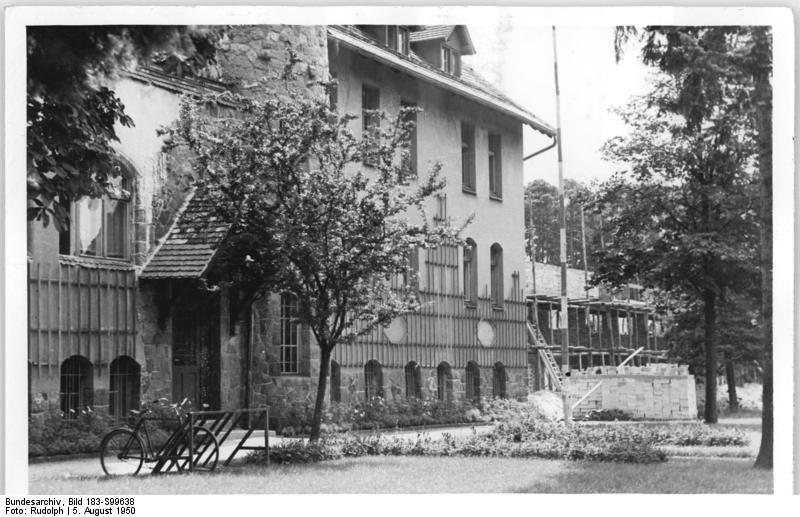 Institut für Ernährung und Verpflegungswissenschaft in Potsdam-Rehbrücke. In Potsdam-Rehbrücke, Strasse der Freiheit, besteht seit 1946 das Institut für Ernährung und Verpflegungswissenschaft. In den Versuchsabteilungen arbeiten hier bewährte Professoren an der Ermittlung und Untersuchung neuer Nahrungsmittel. UBz: Die Aussenansicht des Instituts für Ernährung und Verpflegungswissenschaft in Potsdam-Rehbrücke. Aufn.: Illus-Rudolph 1 7485-50 5.8.50 Schw-Leu Information added by Wikimedia users.